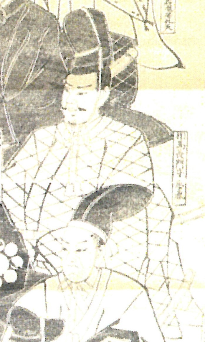 相馬忠胤の画像(「相馬家歴代藩主像」より)。